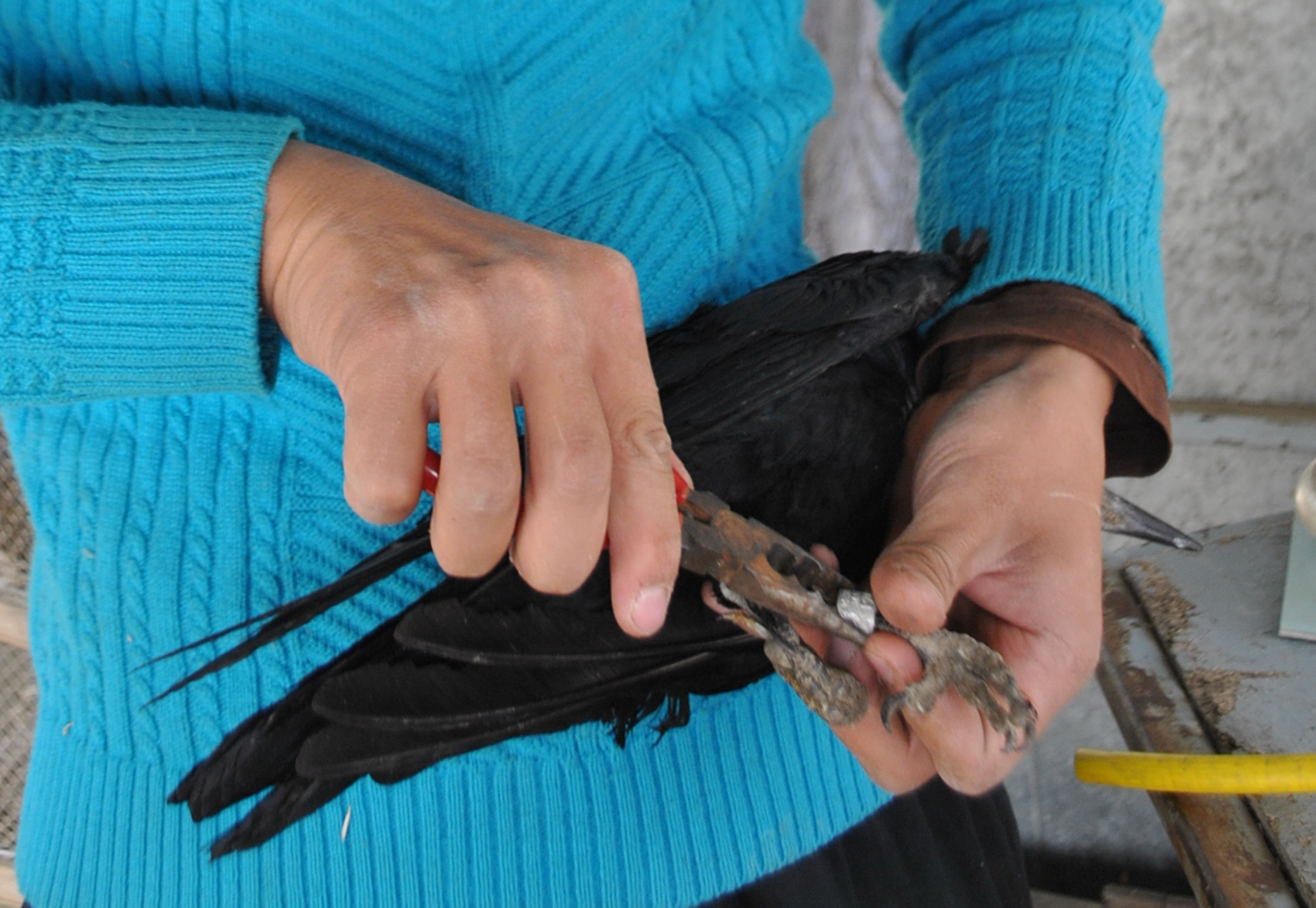 кольцевания грача